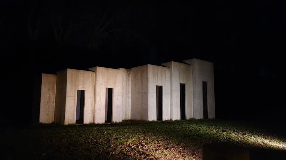 Cromatico öises valguses